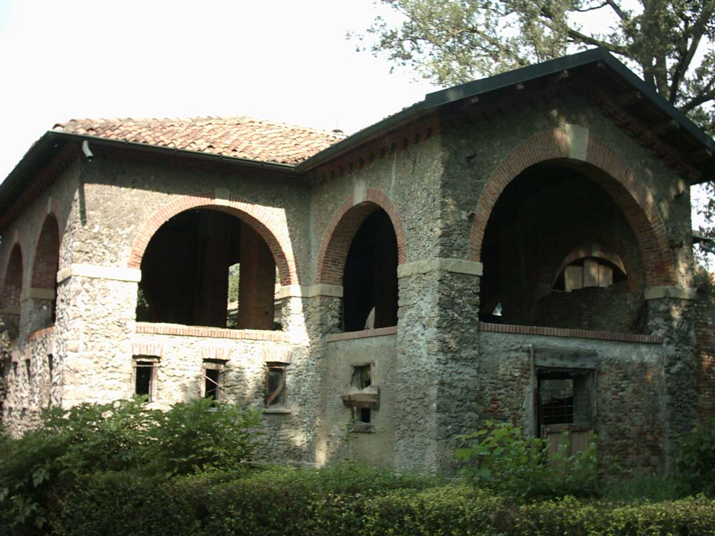 Foto della Cascina Mulini Asciutti situata nel Parco di Monza. Fotografo: Patty Località: Monza Data: agosto 2004. Sorgente: archivio personale. Licenza: GNU FDL (Rilasciata dall'autore).